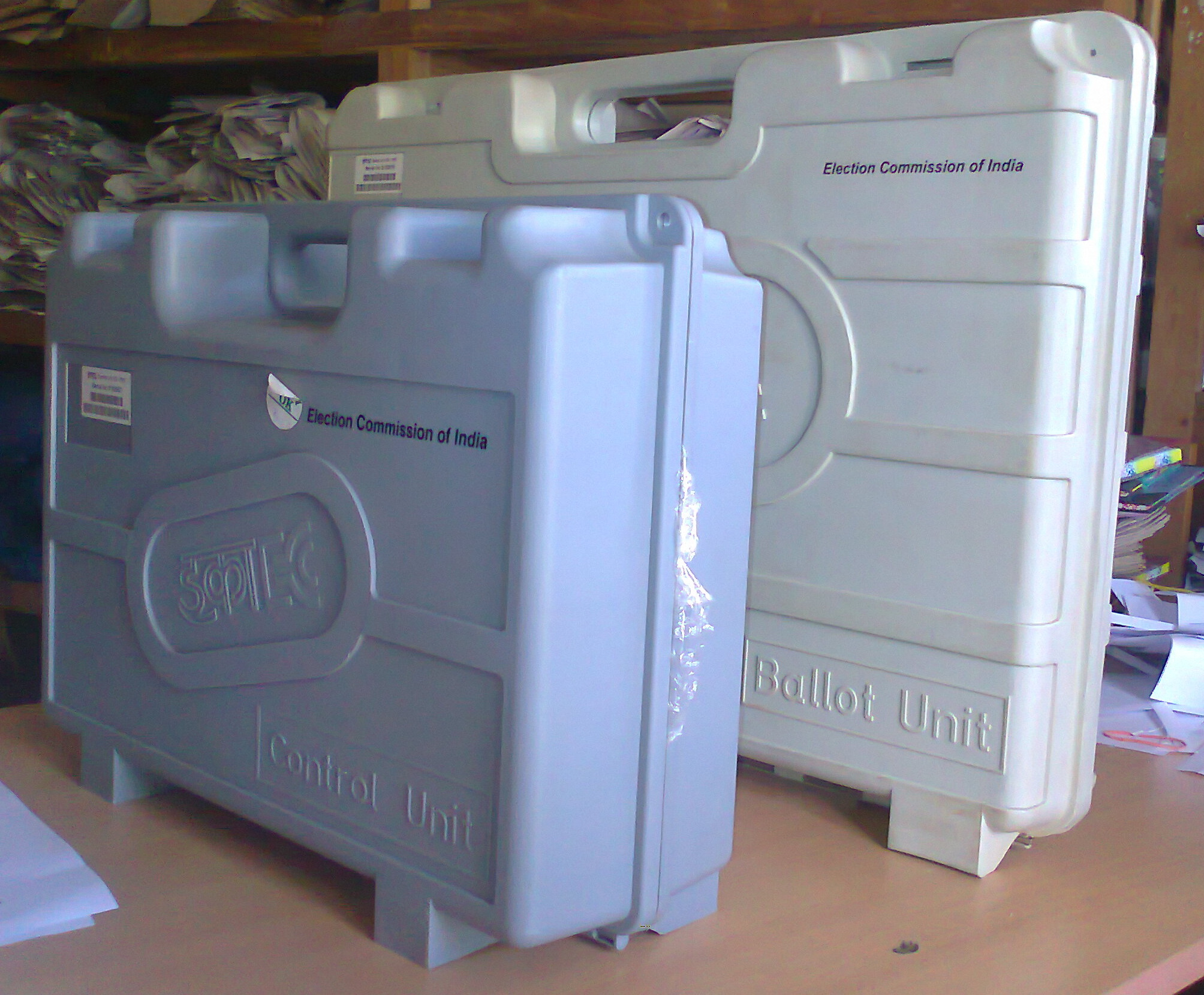 വോട്ടിംഗ് യന്ത്രത്തിന്റെ ഭാഗങ്ങൾ പെട്ടിക്കുള്ളിൽ